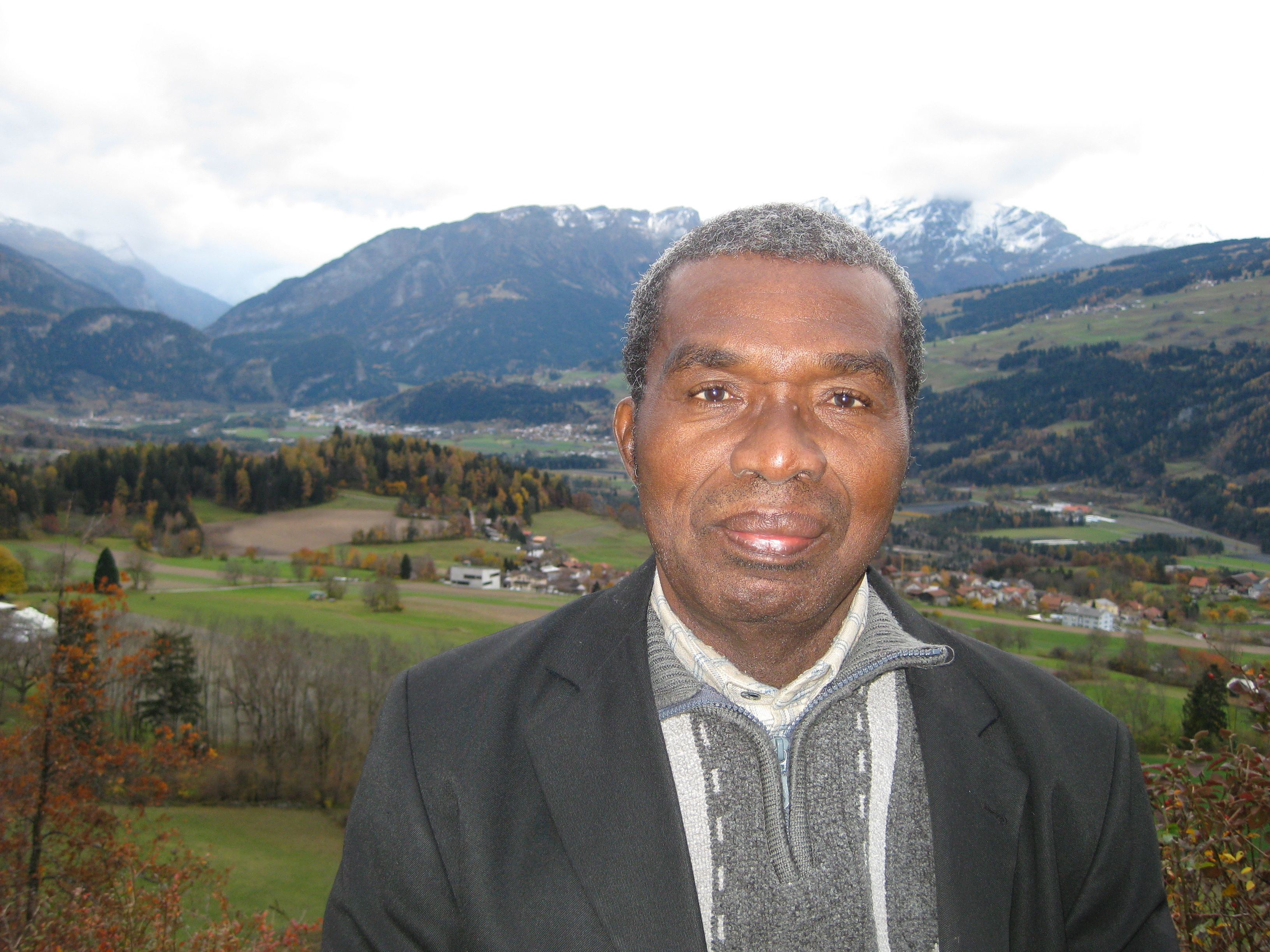 En suisse